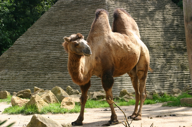 Emmanuel FAIVRE - 2005 - Pris au zoo d'Amnéville